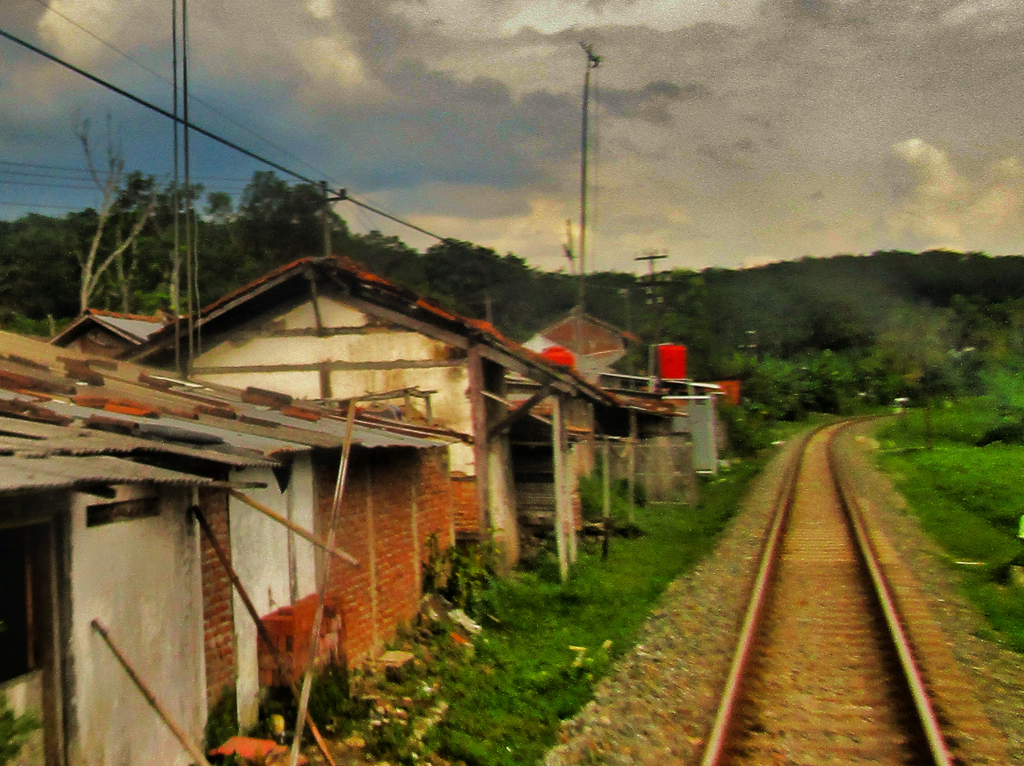 Bangunan utama Halte Cilongkrang 2020